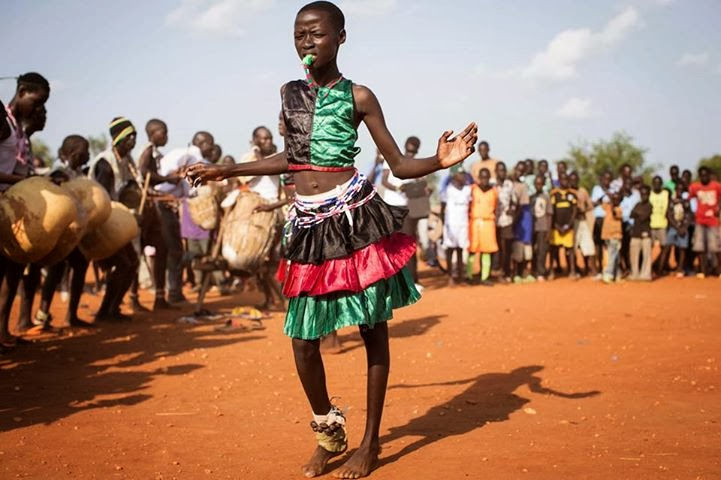 נערה מקבוצת הלוגברה שבאוגנדה רוקדת ריקוד מסורתי בפסטיבל מקומי